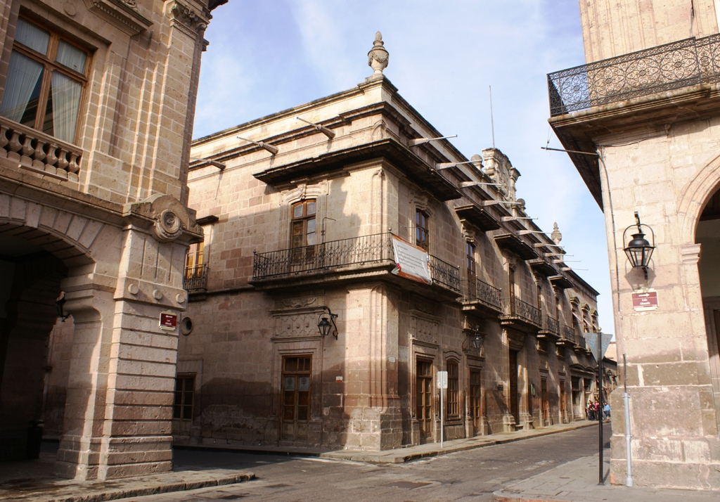 Exterior del Museo Regional Michoacano ubicado en el centro histórico de Morelia, Michoacán, México.